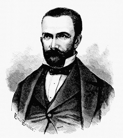 Jacopo Foroni (1825-1858)